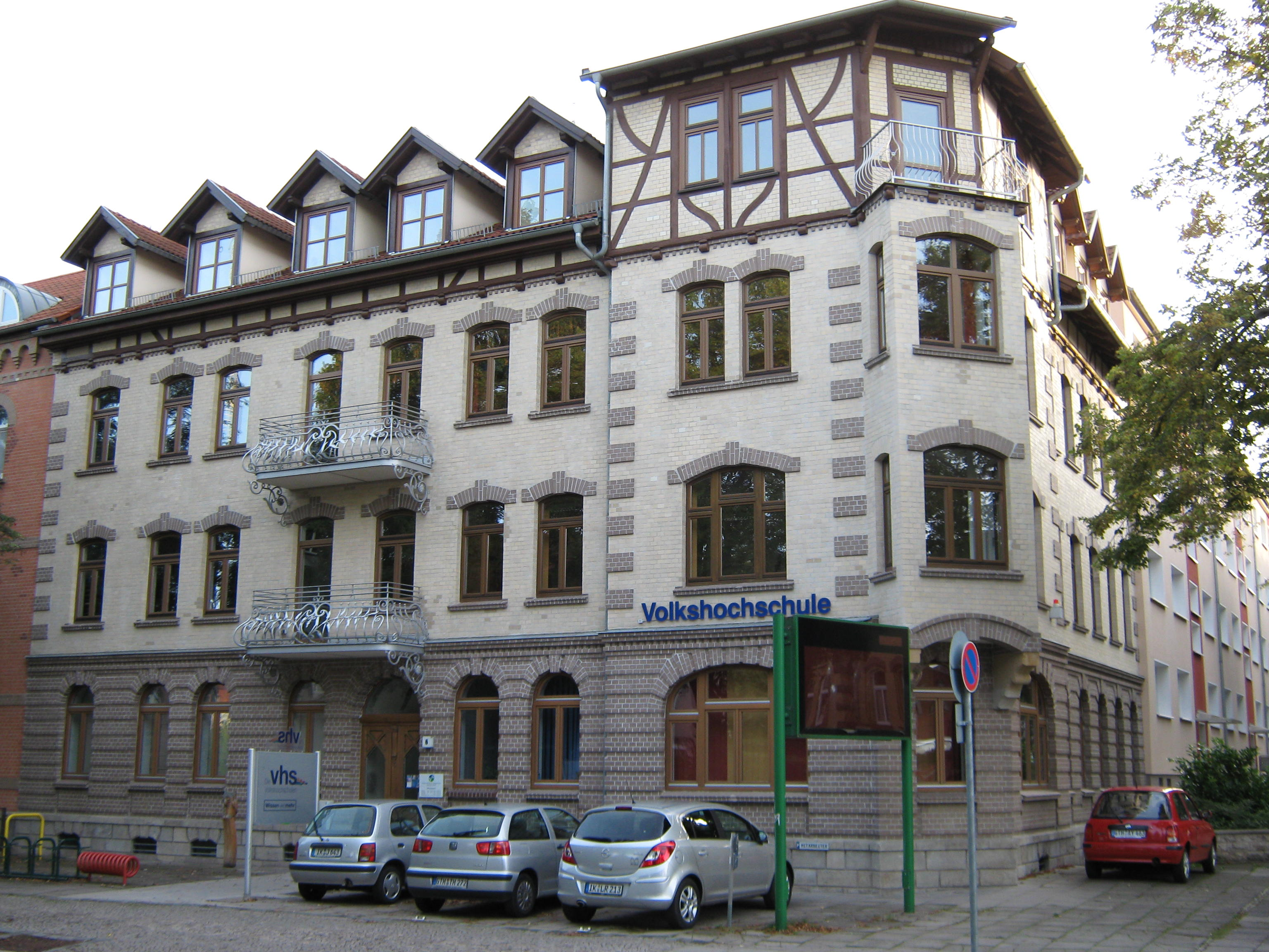 Volkshochschule Arnstadt, beim Hauptbahnhof.